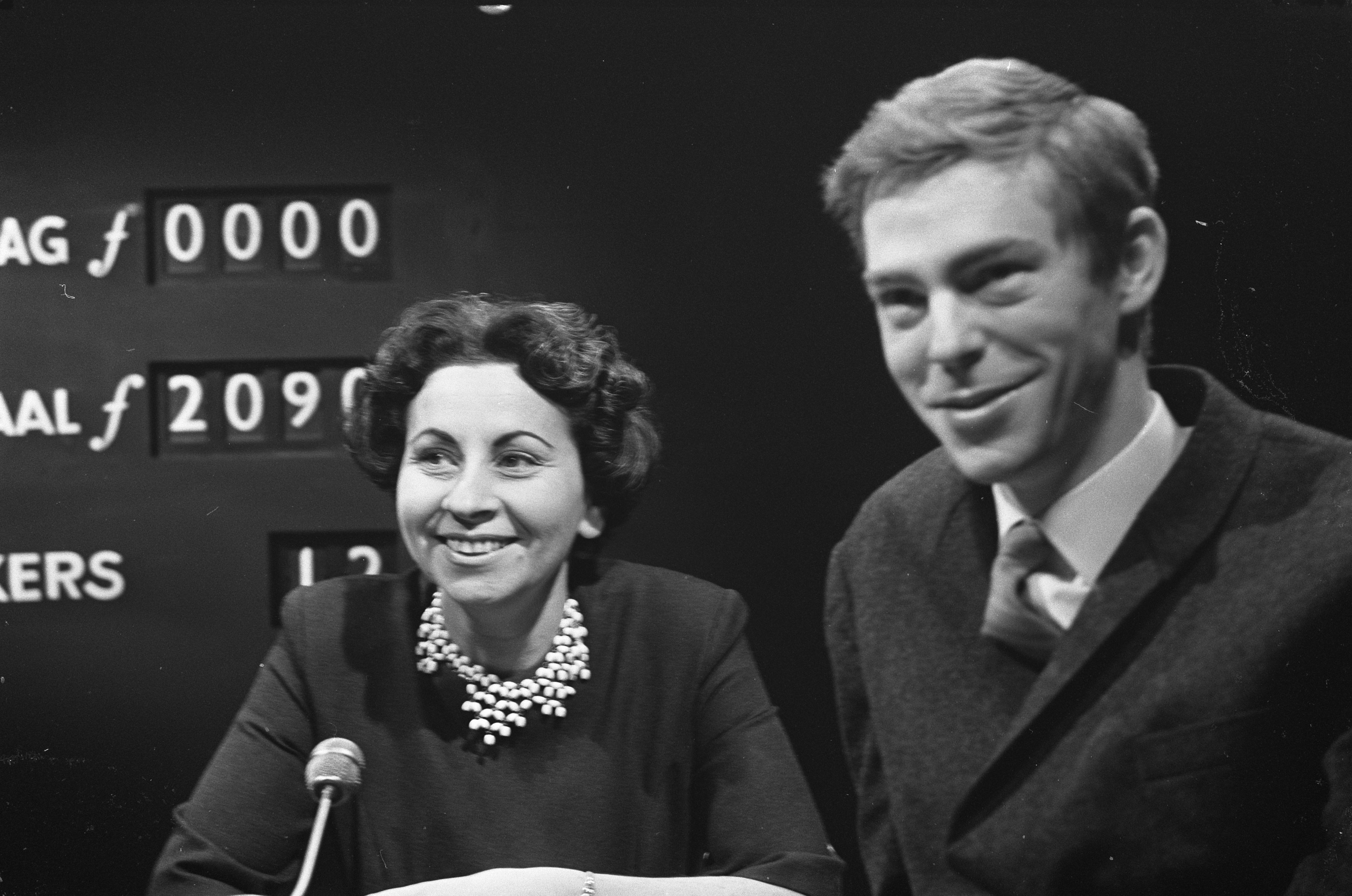 Collectie / Archief : Fotocollectie Anefo Reportage / Serie : [ onbekend ] Beschrijving : 'Per seconde wijzer', TV-quiz onder leiding van Berend Boudewijn (rechts); kandidate mevrouw Liliane Libgott met het onderwerp geschiedenis Datum : 12 februari 1968 Trefwoorden : kandidaten, presentatoren, quizprogramma's, televisie Persoonsnaam : Boudewijn, Berend, Libgott, Liliane Fotograaf : Nijs, Jac. de / Anefo Auteursrechthebbende : Nationaal Archief Materiaalsoort : Negatief (zwart/wit) Nummer archiefinventaris : bekijk toegang 2.24.01.05 Bestanddeelnummer : 921-0707